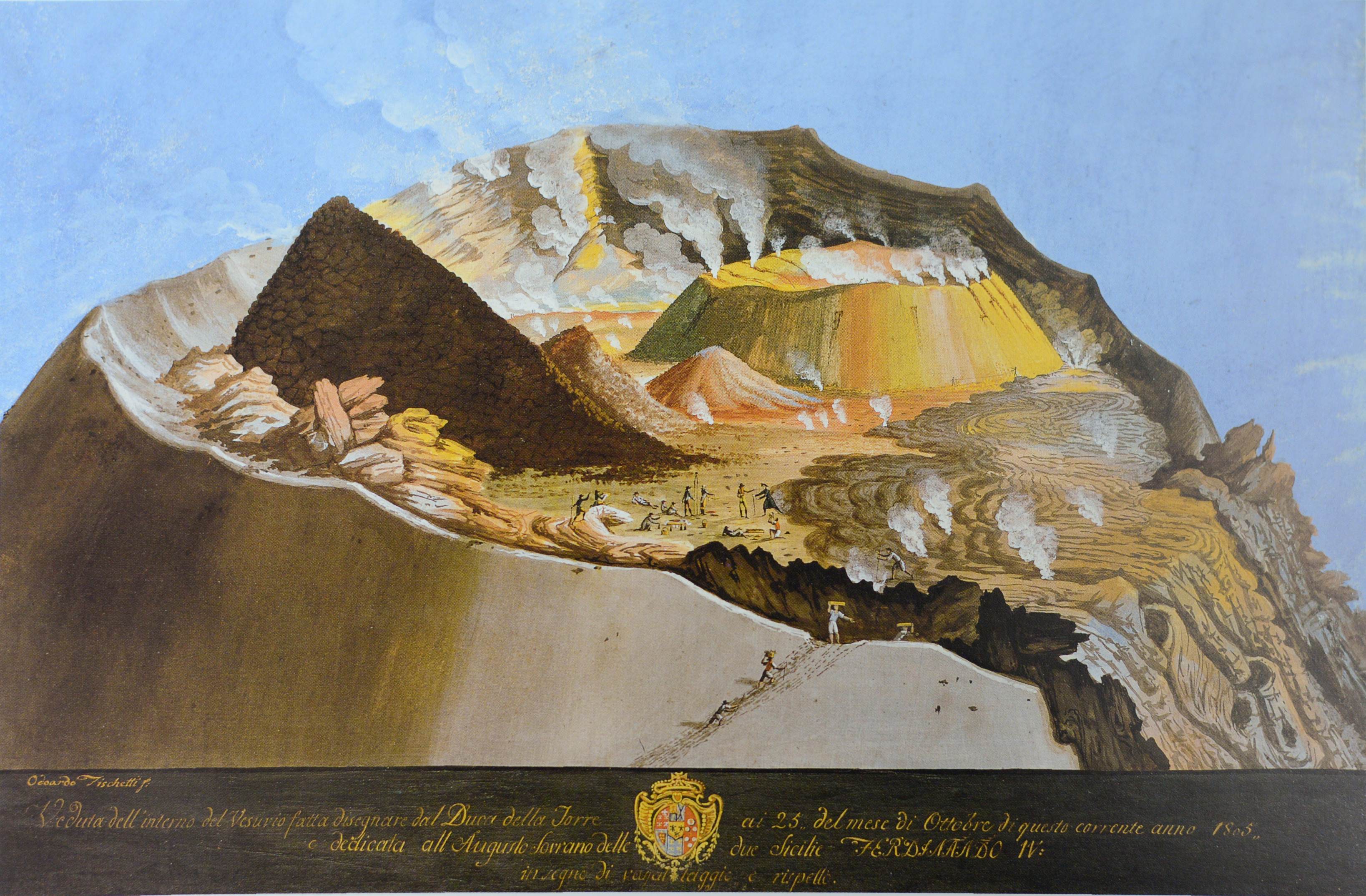 Interno del Vesuvio